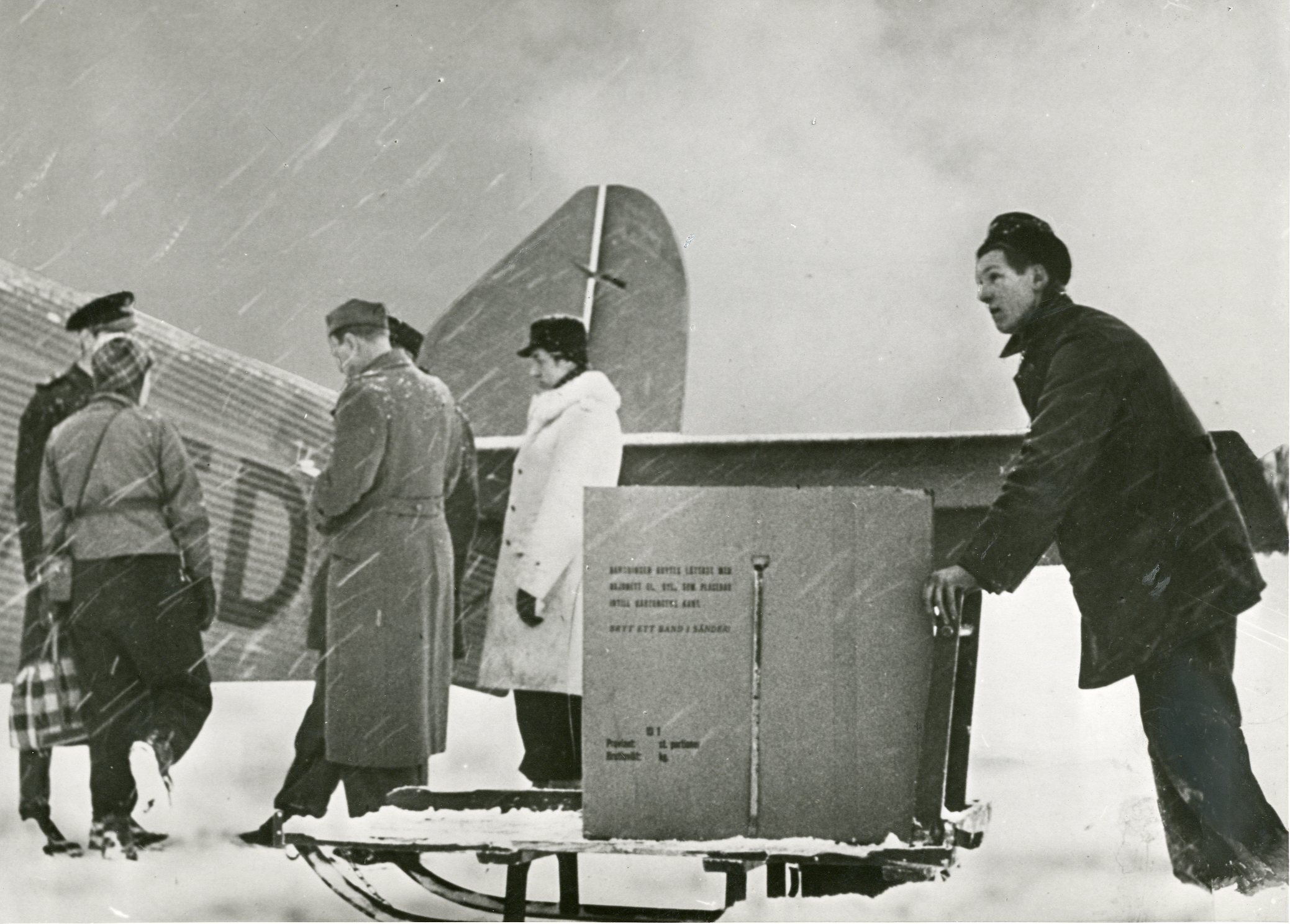 Under tyskernes tvangsevakuering av Nord-Norge oktober 1944 lyktes det en del av sivilbefolkningen å ta seg over til Sverige. Under store strabaser og lidelser, hvorunder det også inntraff dødsfall, strevet de seg frem over fjellviddene inntil de til slutt var i sikkerhet på svensk område. De svenske myndigheter satte i gang et storstilet hjelpearbeid som tok sikte på å undsette flyktninger fra de øde strekningene fra grensen og inn til nærmeste grensepostering. Blant annet ble det fra fly kastet ned mat, klær og ski til flyktningene. Bildet viser Aerotransports fly ”Vikingaland” bli lastet med proviantkasser for å undsette innesnødde flyktninger.Stockholm 24.1.45. RA/Pa-1209/Uc¬¬/68/1/S5414